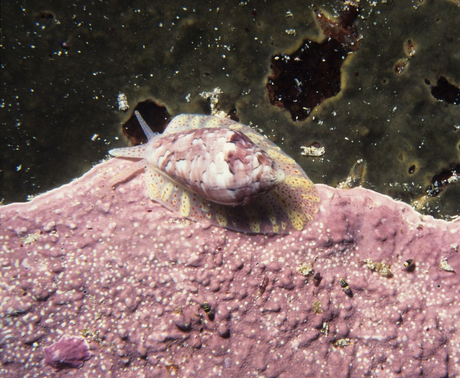 A delicate marginella (Marginella sp)